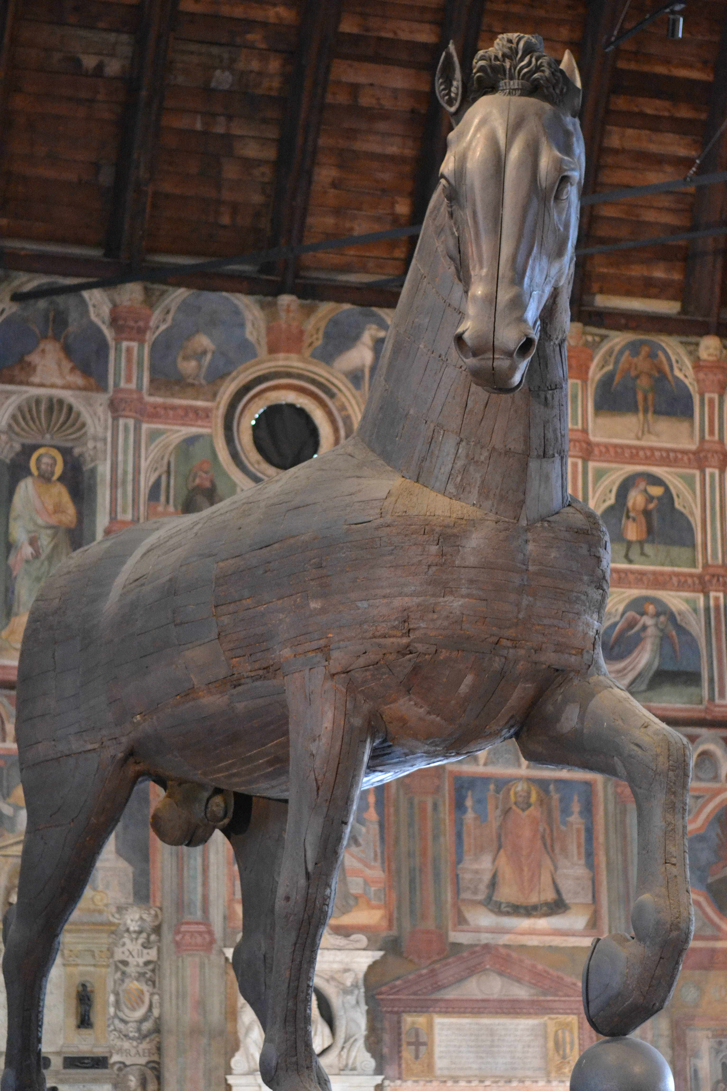 Noto anche (erroneamente) come Cavallo di Donatello è uno dei simboli di Padova. Il Cavallo misura 5,75 metri di altezza e ha una circonferenza sull’addome di 6,20 metri: in passato veniva usato per delle rappresentazioni a tema dell’Iliade con il chiaro ruolo di Cavallo di Troia, poteva ospitare fino a 20 persone. This is a photo of a monument which is part of cultural heritage of Italy.